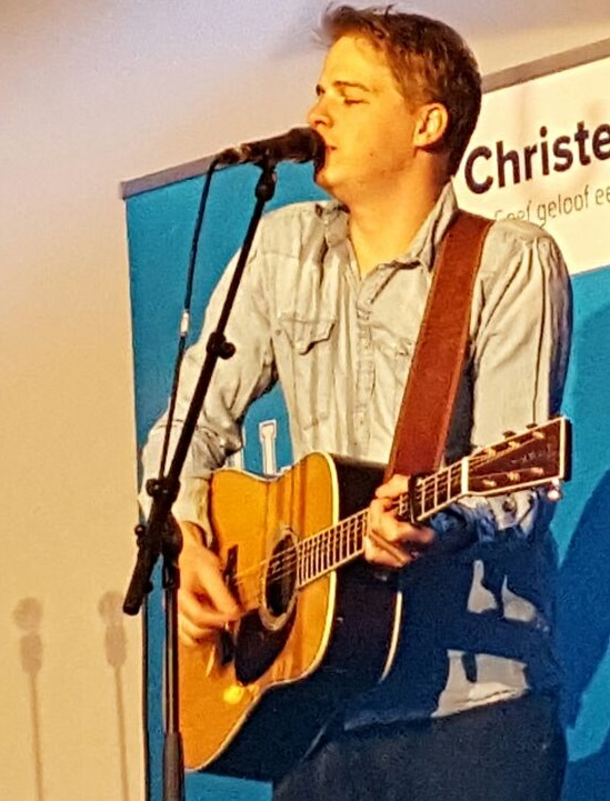 Zanger Matthijn Buwalda op Opwekking 2016 tijdens de College Tour van de ChristenUnie waar hij in gesprek ging met fractievoorzitter Gert-Jan Segers